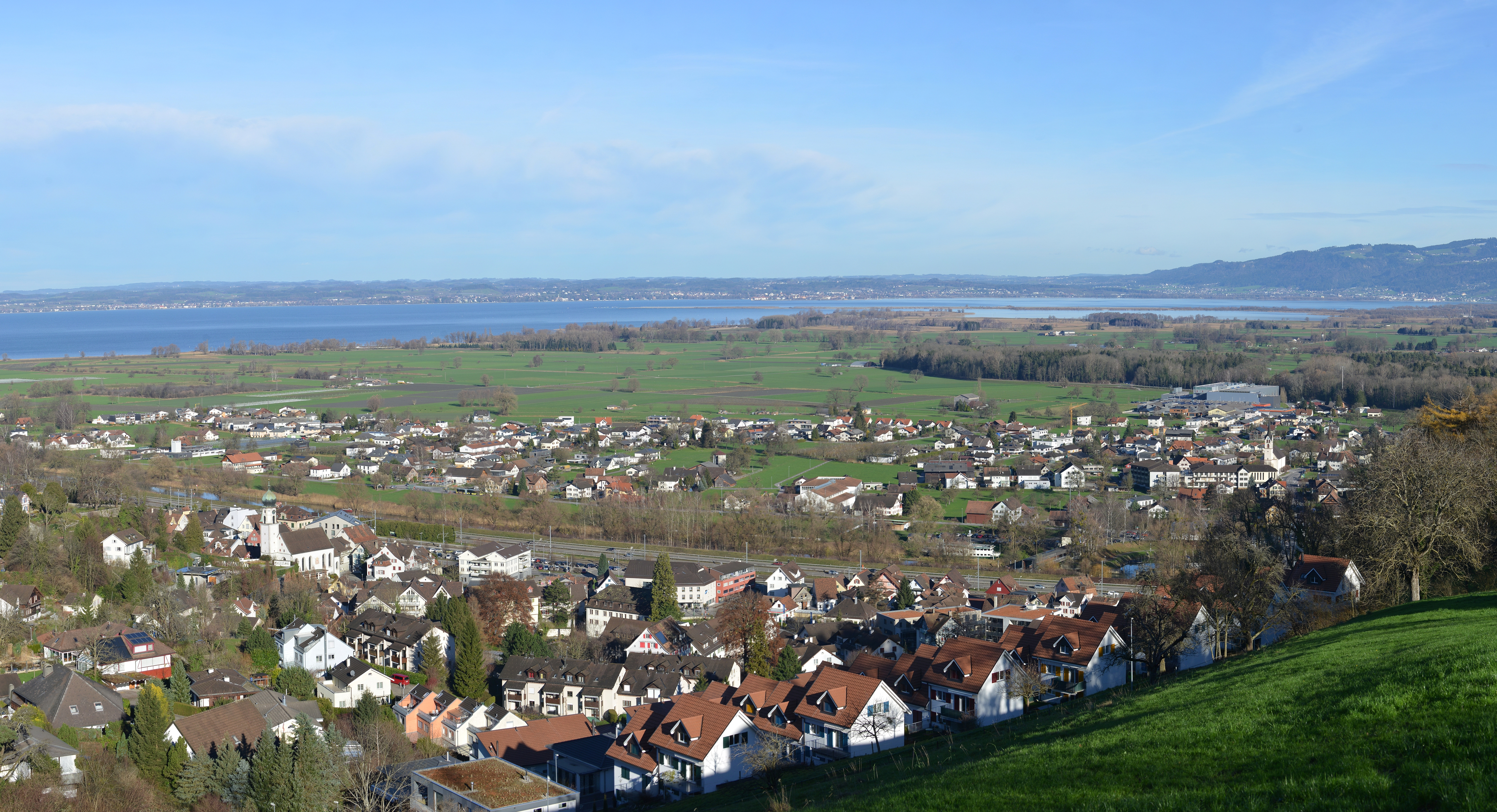 Ortsbild von Rheineck SG über der Autobahn A1 die Gemeinde Gaißau. Im Hintergrund der Bodensee. Am rechten Bildrand das Werk 6 von Julius Blum GmbH